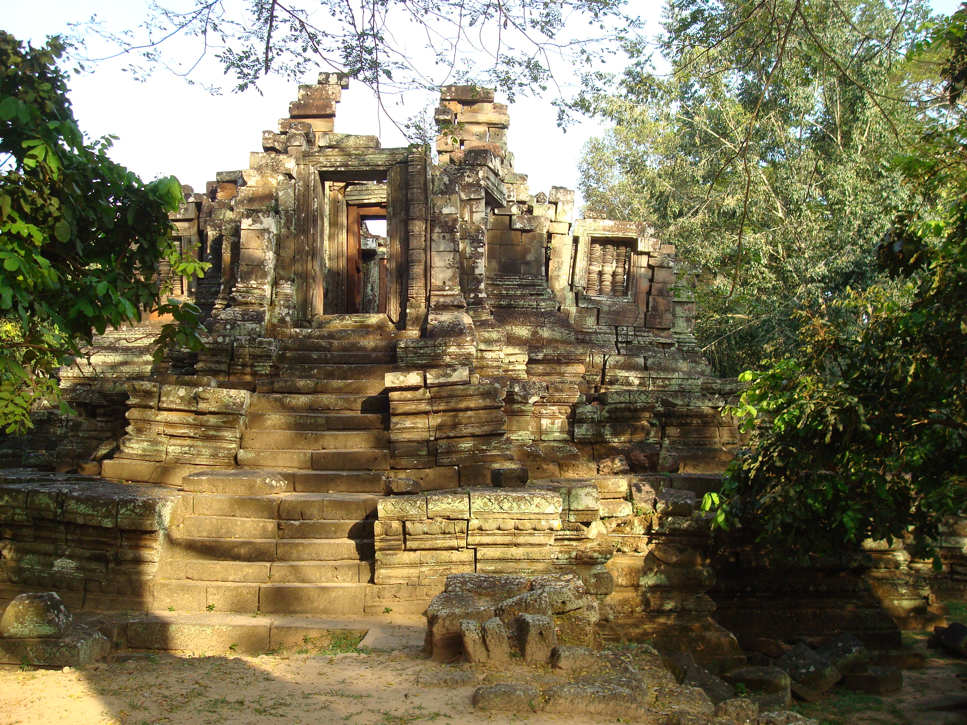 Tempel V